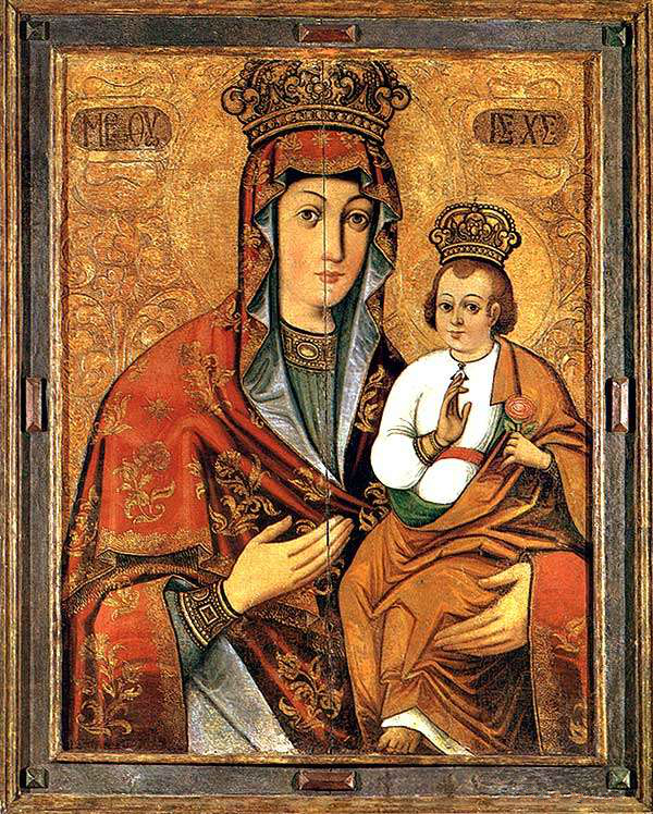 Маці Боская Адзігітрыя Неўвядальны цвет. 16 ст. Дошка, яечная тэмпера. 128,5х101х2,5-5.